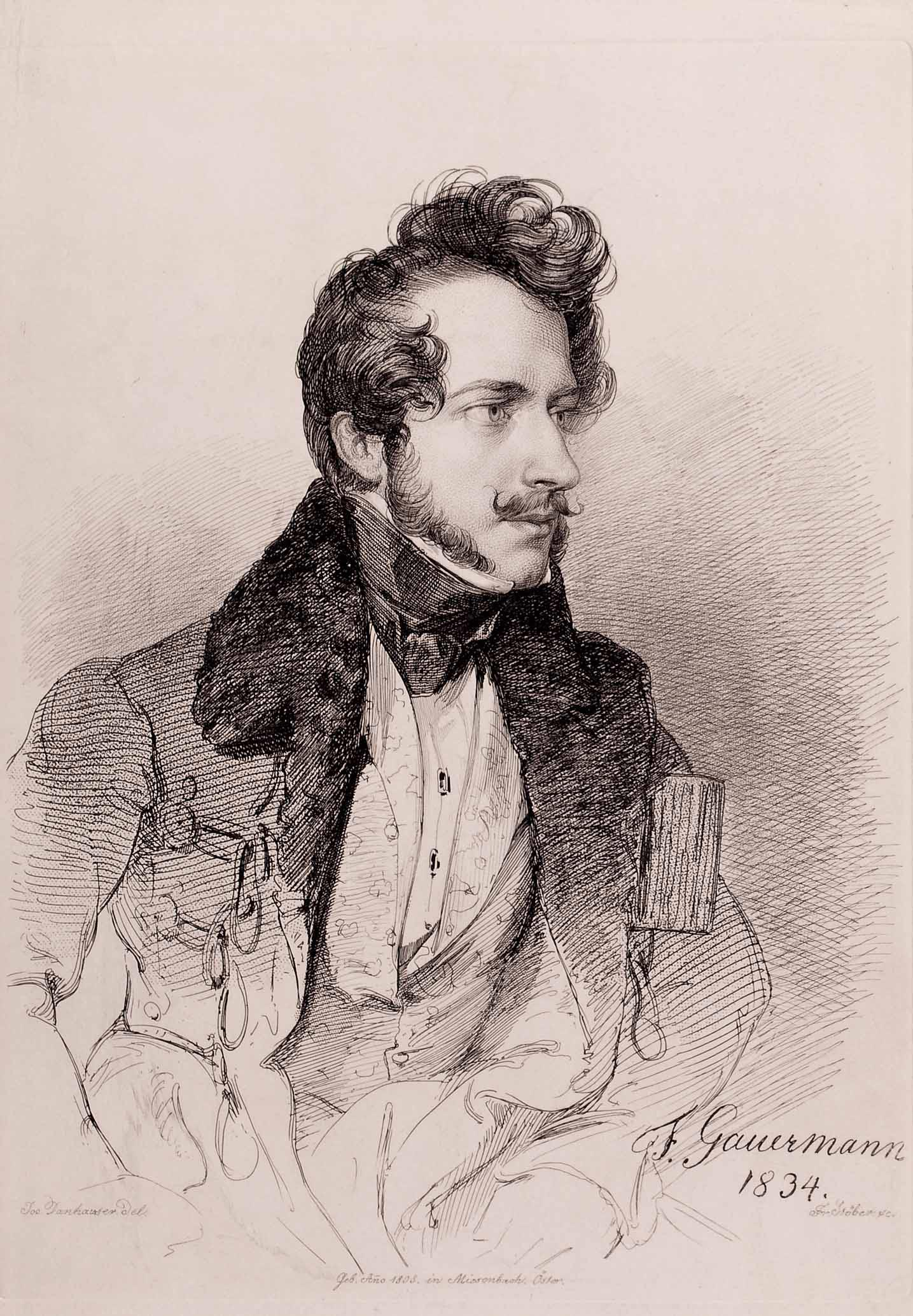 Friedrich Gauermann